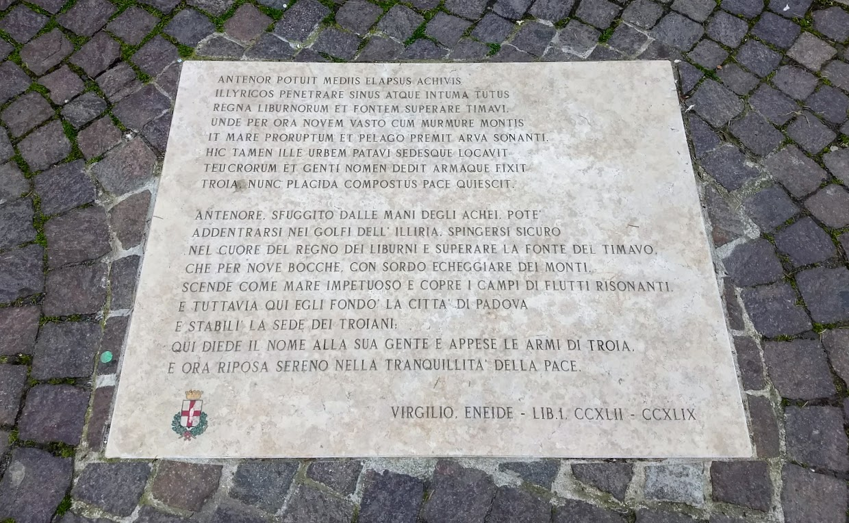 Padova